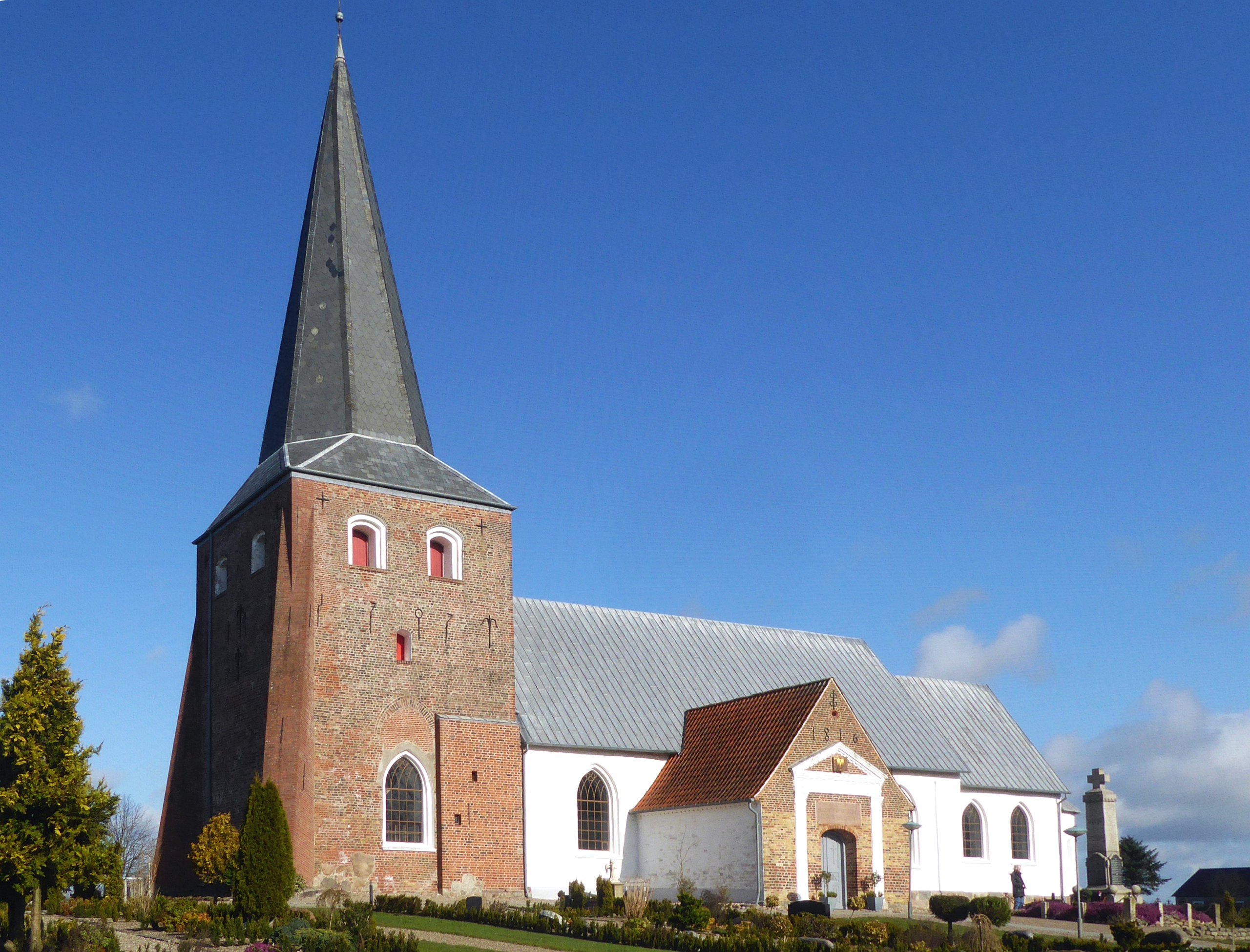 Bjolderup kirke Turm aus Klinkermauerwerk mit schrägen massiven Stützen Bjolderup Sogn - Syddanmark - Foto Wolfgang Pehlemann P1350995